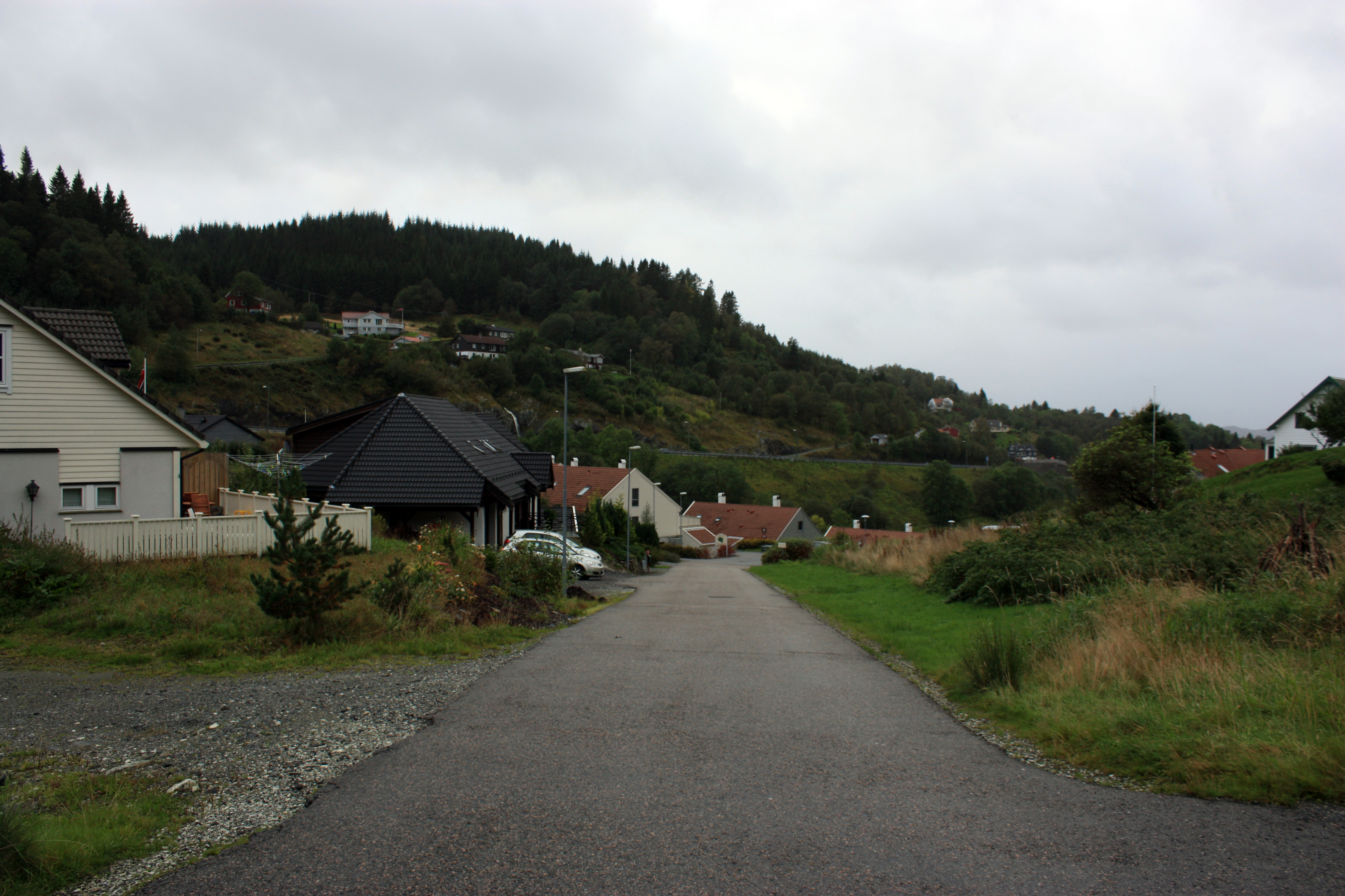 Nedre Kirkebirkeland, Fana, Bergen.